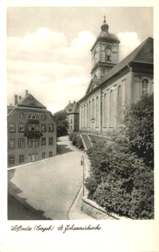 Lößnitz (Erzgebirge), St. Johanniskirche